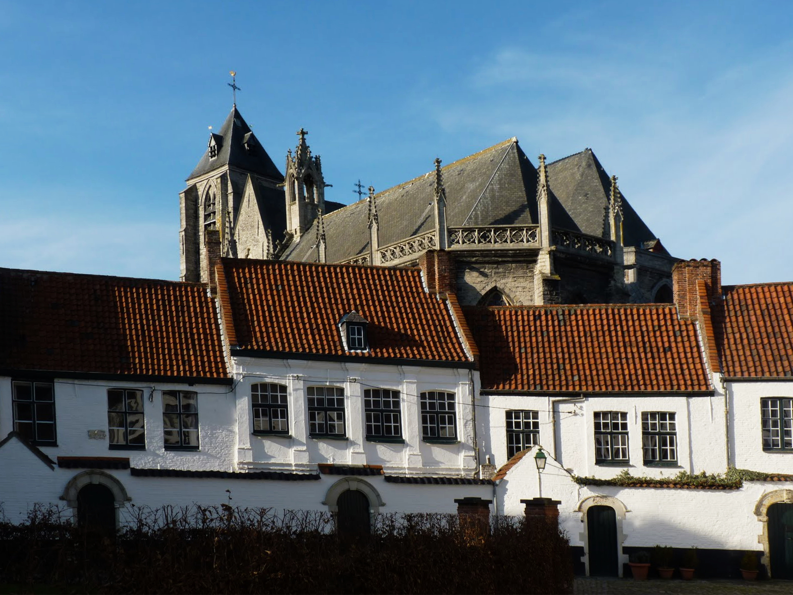 Béguinage Sainte-Elisabeth de Courtrai Courtrai (Begijnhof Sint-Elisabeth) Belgique.